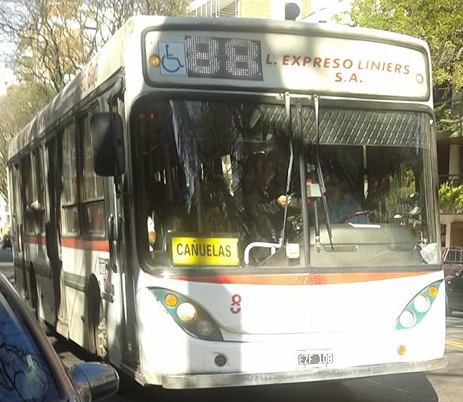 Linea 88